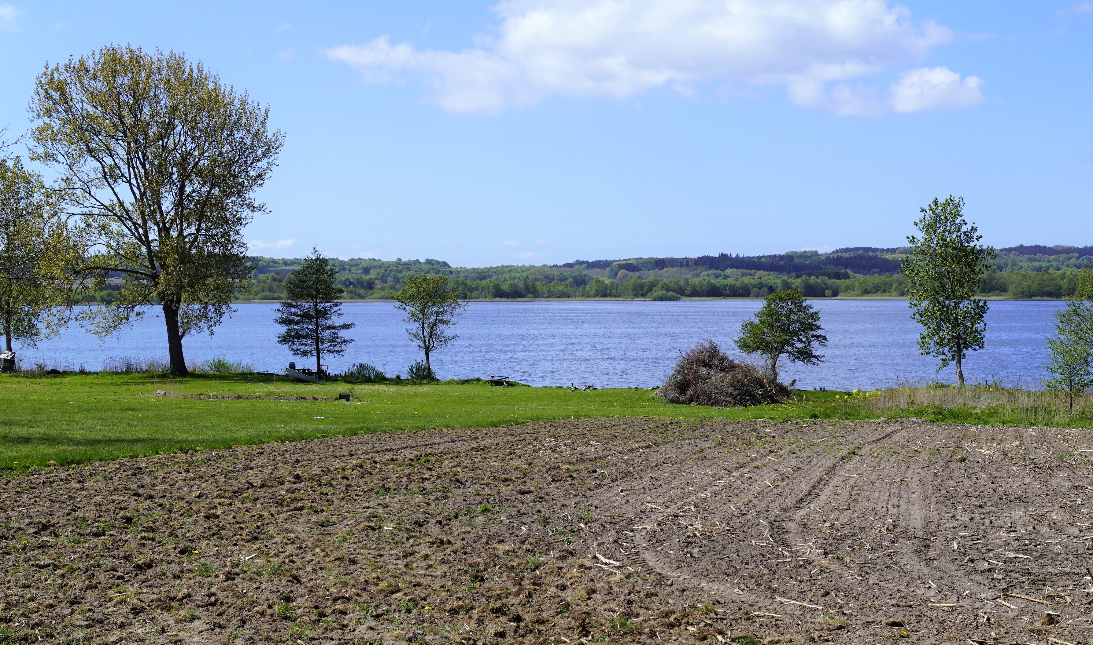 Arreskov Sø på Fyn set fra øst